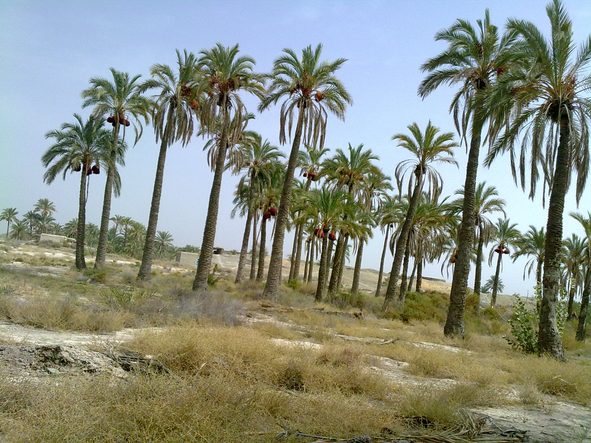 نخلستان چانف - ملینچان